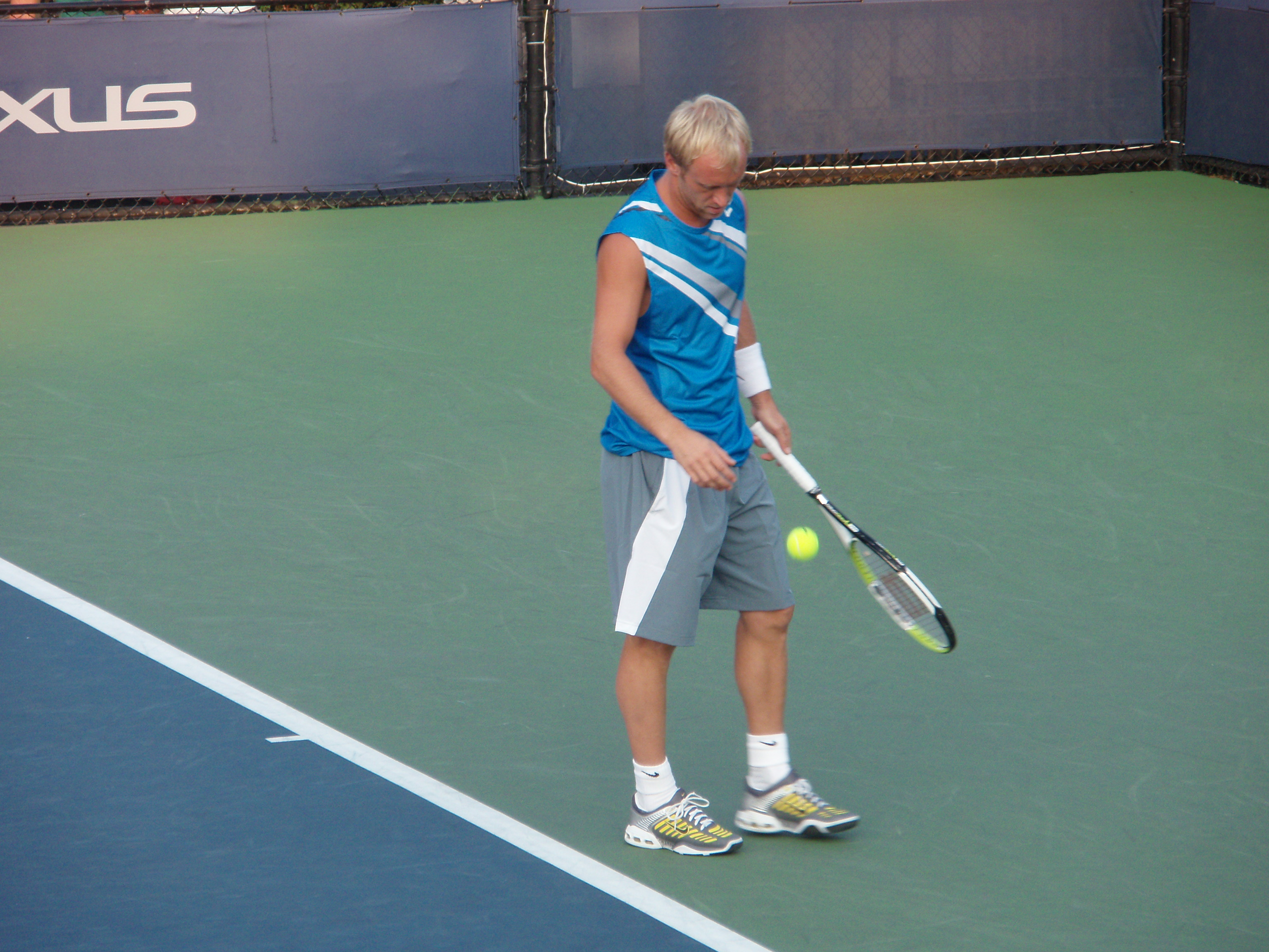 Stefan Koubek At The 2007 US Open